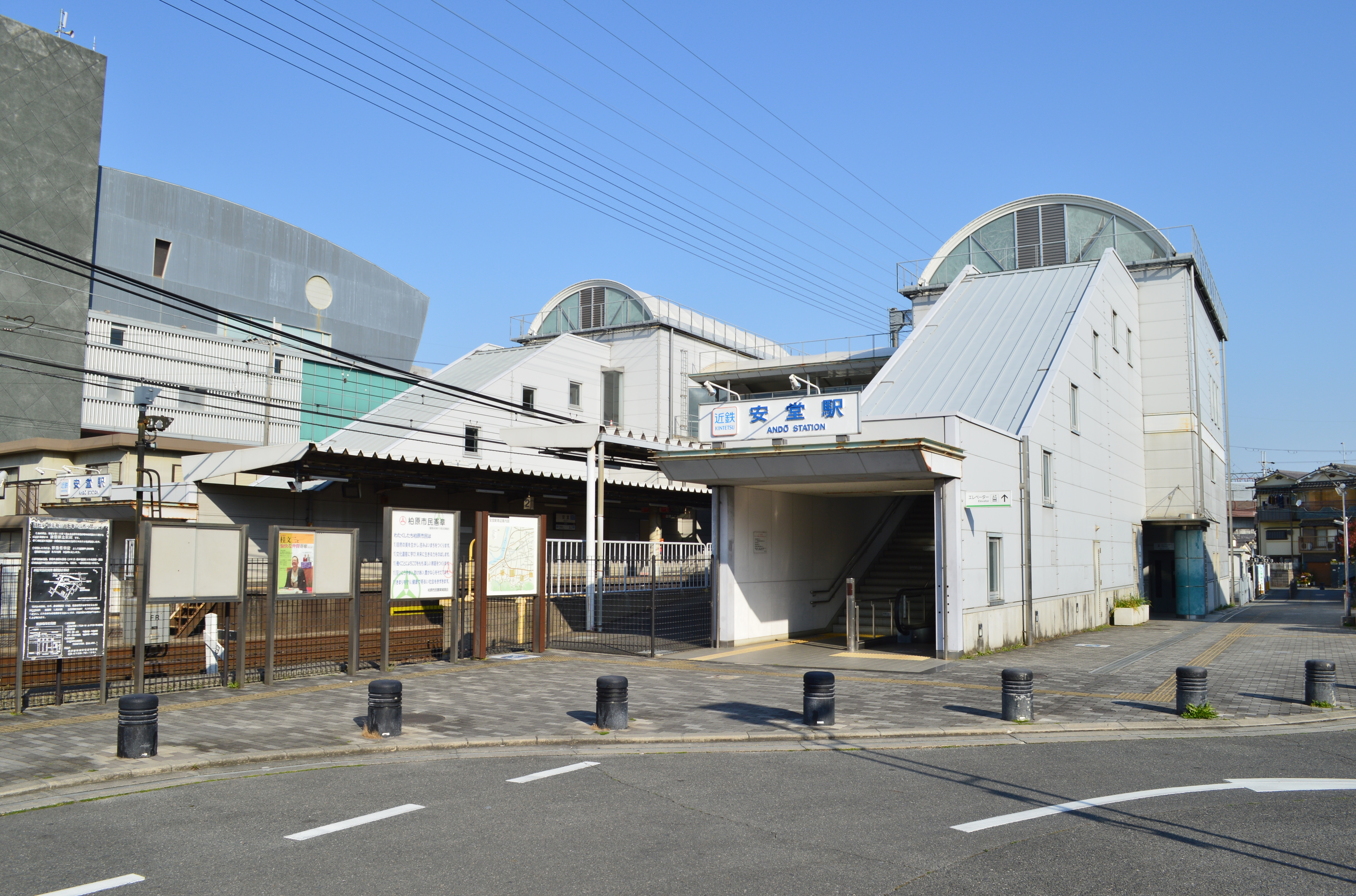 安堂駅 駅舎